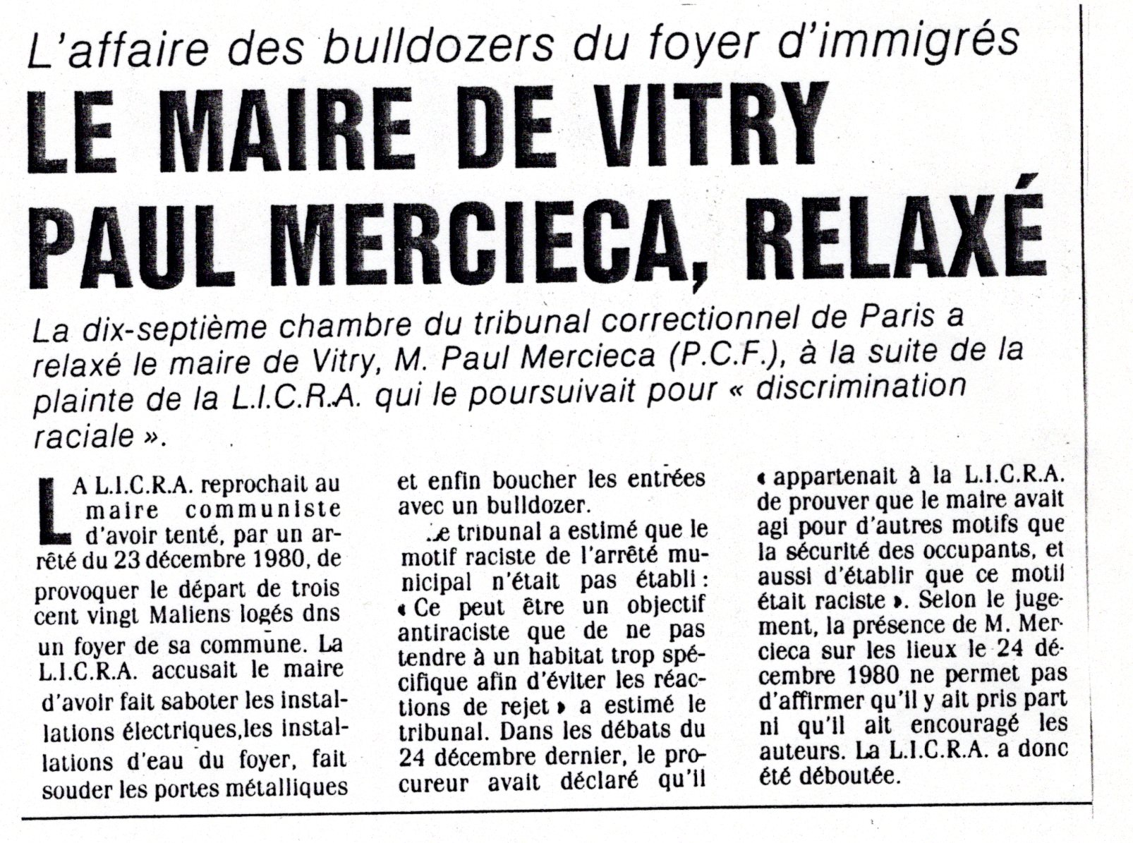 ArticlePresse